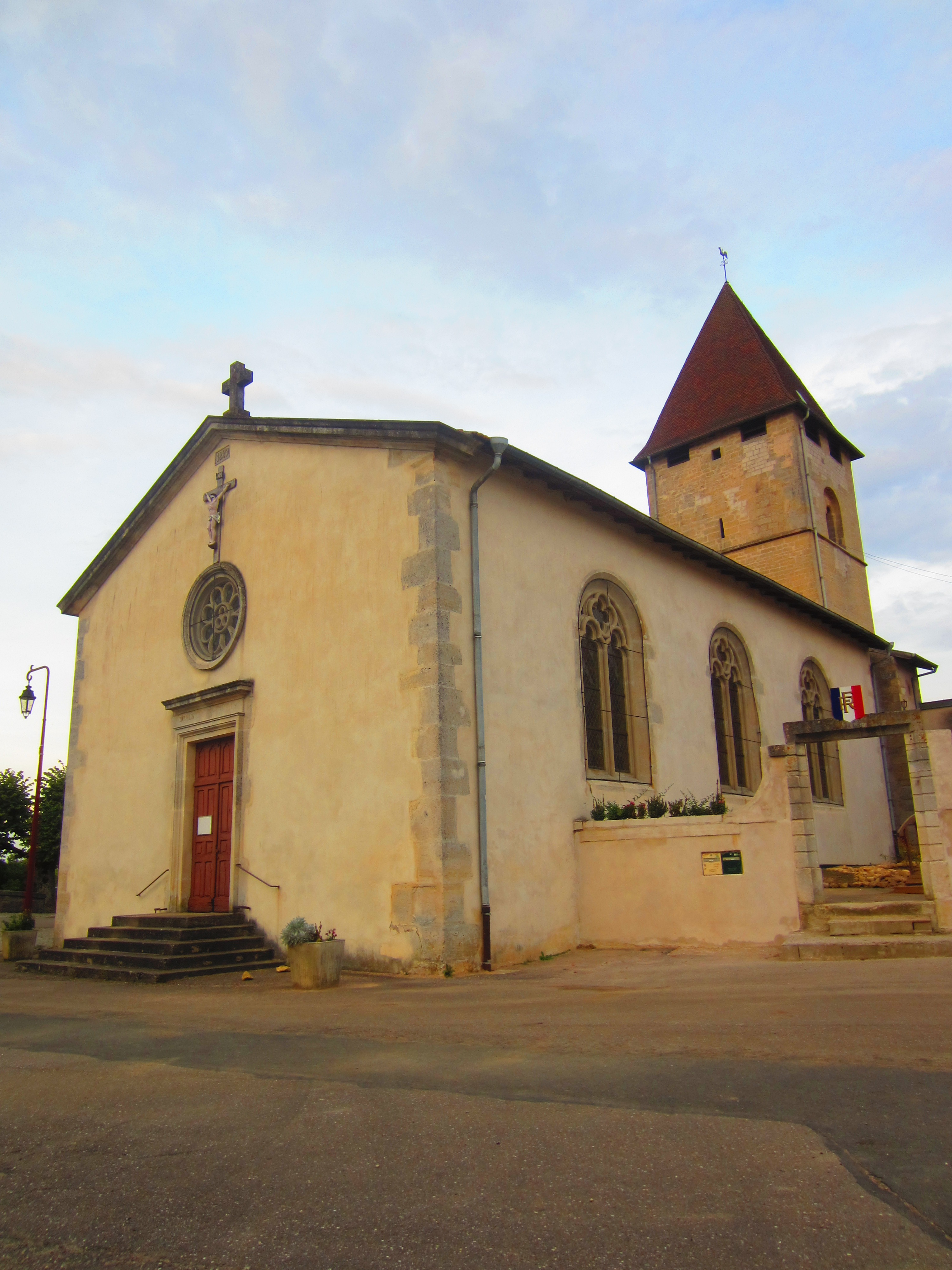 Eglise Andilly